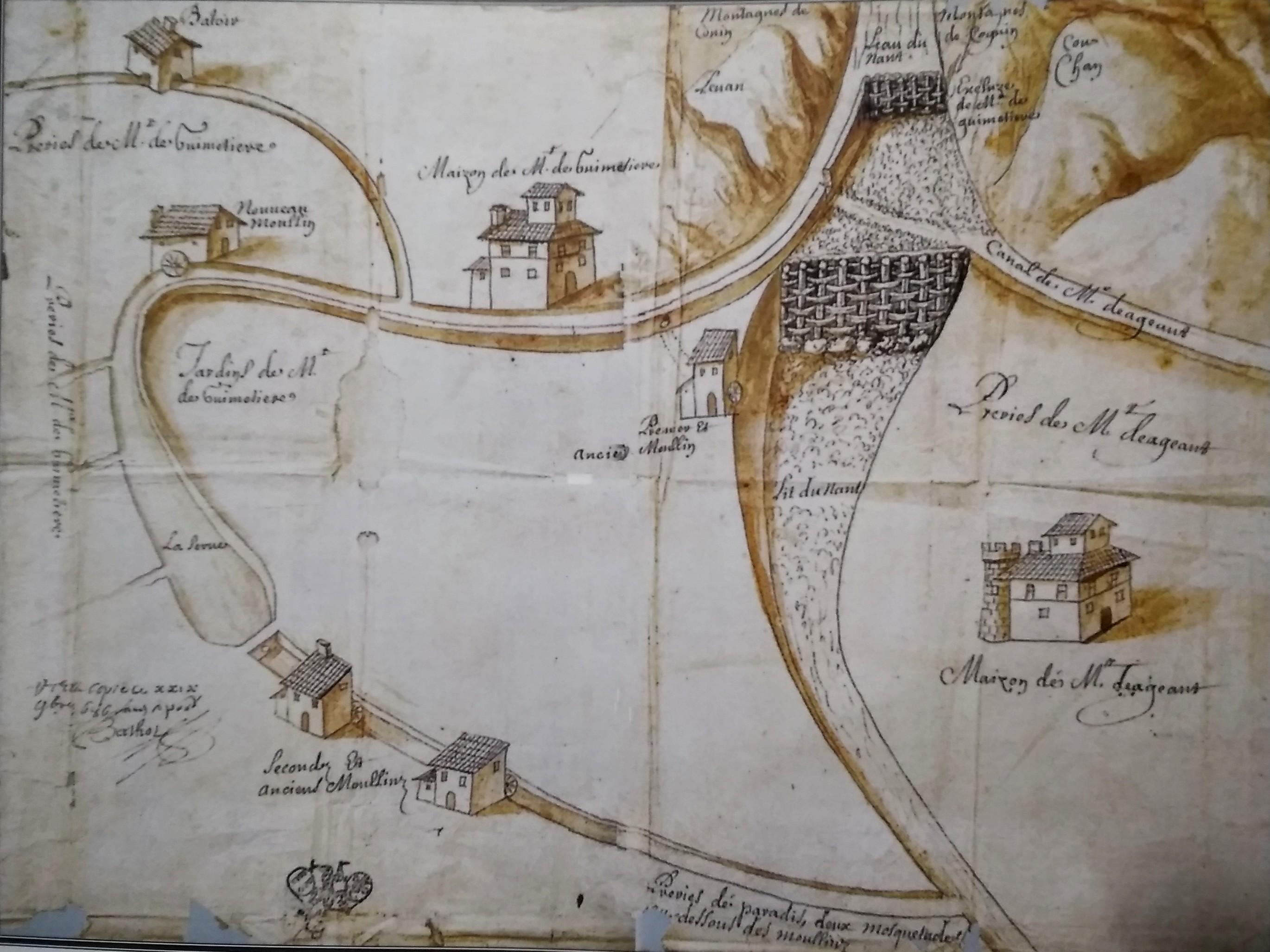 Carte des canaux de Cognin (17 ème siècle)